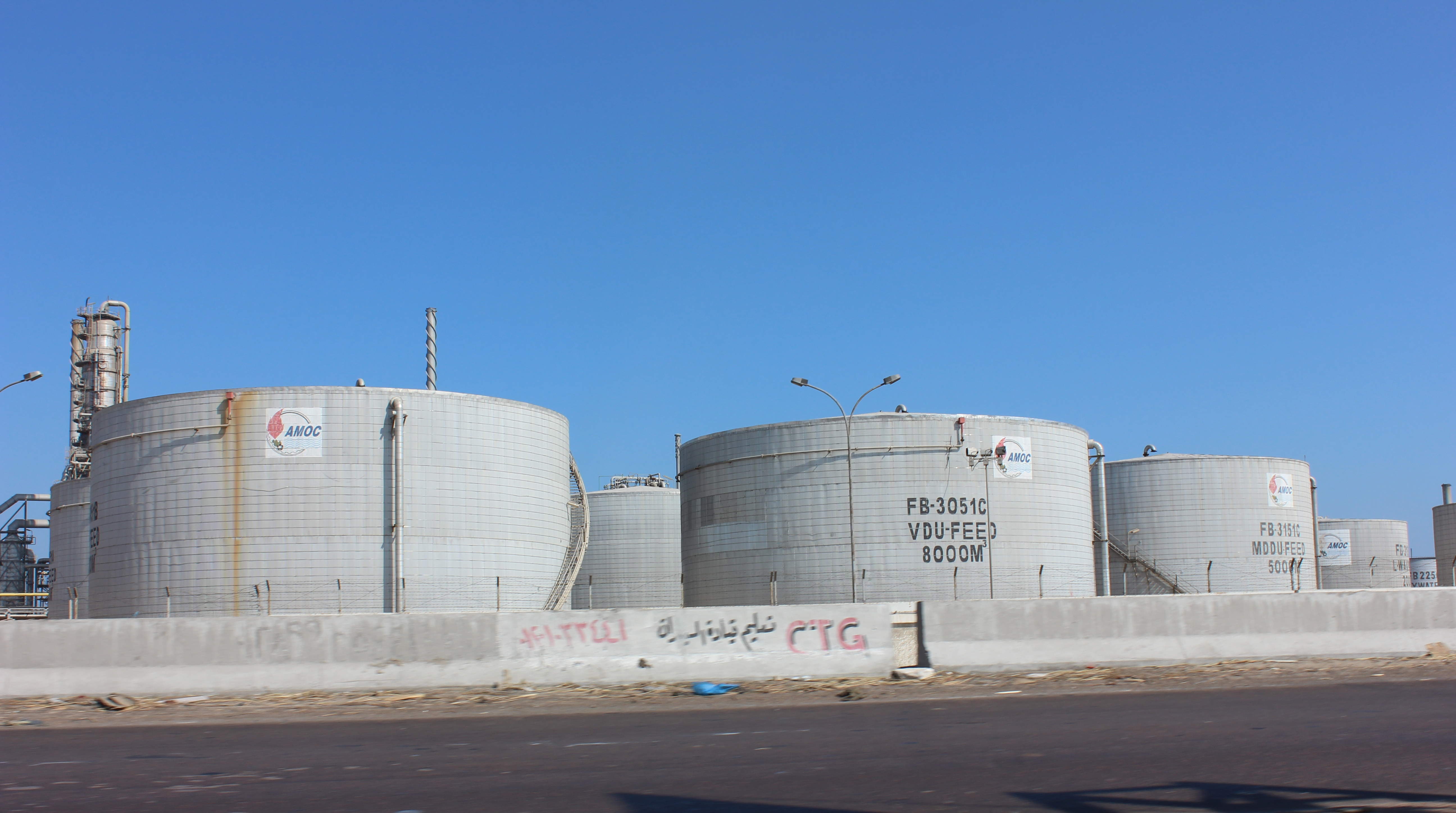 الطريق الدولي الساحلي بالإسكندرية.